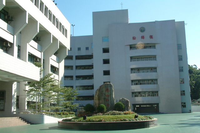 中文（台灣）: 泰北高中前庭。